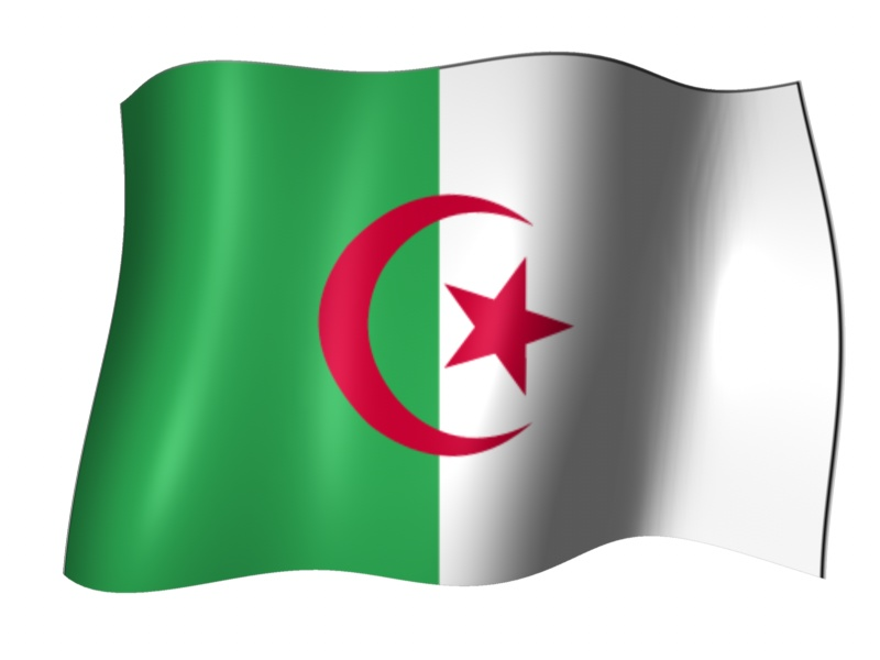 Popis: Alžírska vlajka + vietor Zdroj: Private Dátum: 13.7.2005 Autor: Robo Blazek, Pezinok, Slovakia Povolenie: Use at will Iné verzie tohto súboru: nie